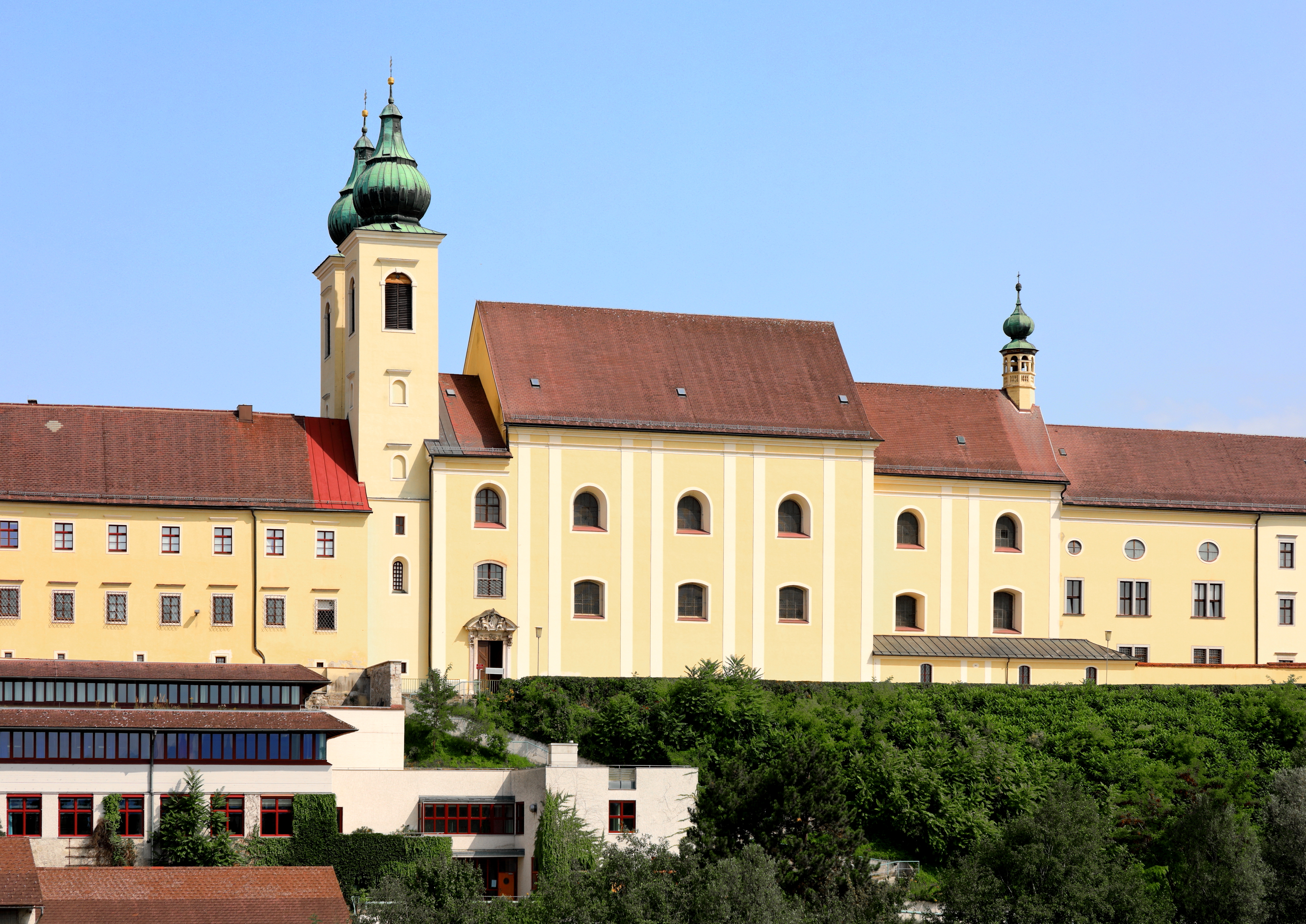 Südwestansicht der Stifts- und Pfarrkirche Mariä Himmelfahrt in der oberösterreichischen Marktgemeinde Lambach. Die Kirche wurde von 1652 bis 1656 unter Einbeziehung von Teilen der Vorgängerkirche errichtet.